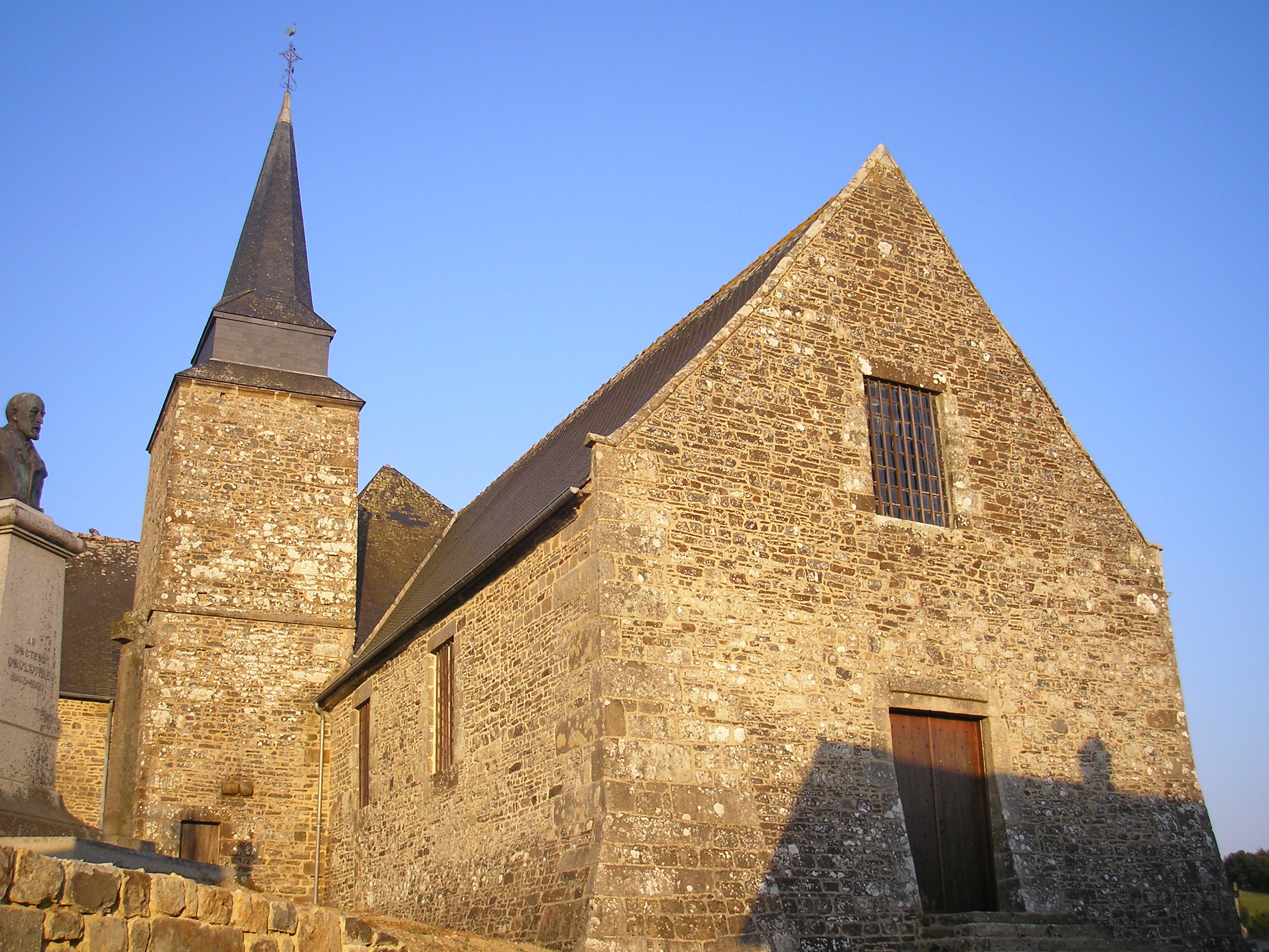 Tinchebray (Normandie, France). L'église Notre-Dame des Montiers.